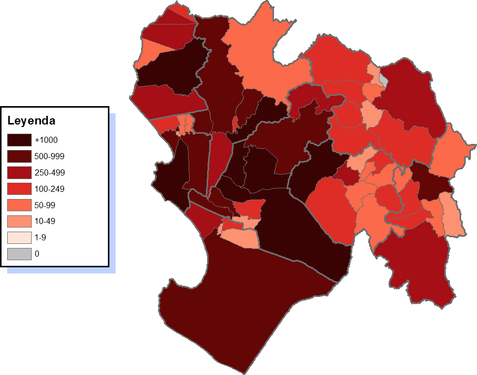 description=